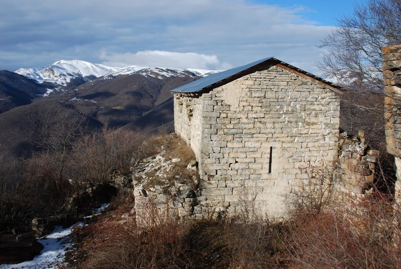 ღვთისმშობლის მთავარი ეკლესია